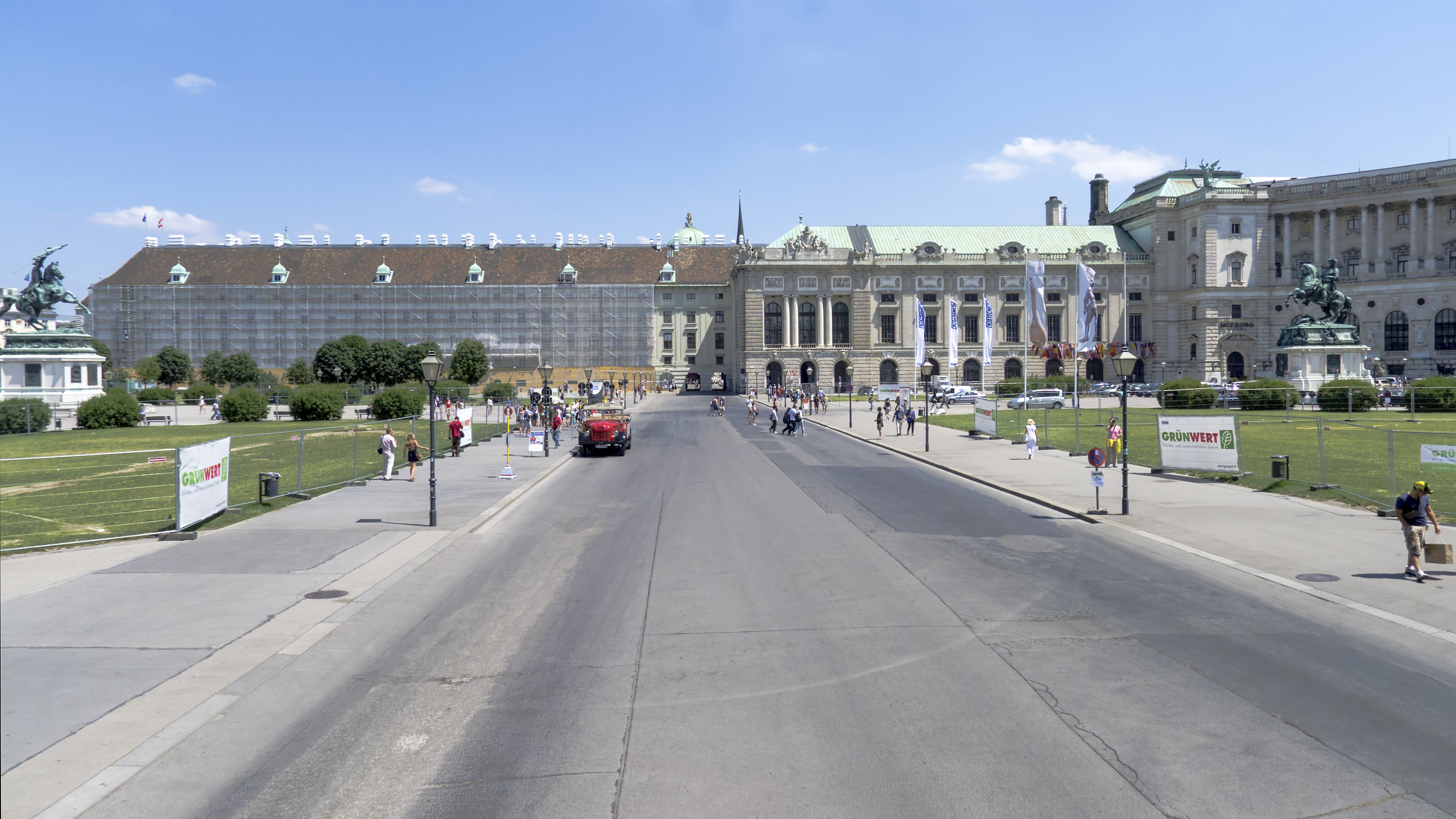 Heldenplatz in Wien 1 beim äußeren Burgtor Richtung Nordosten